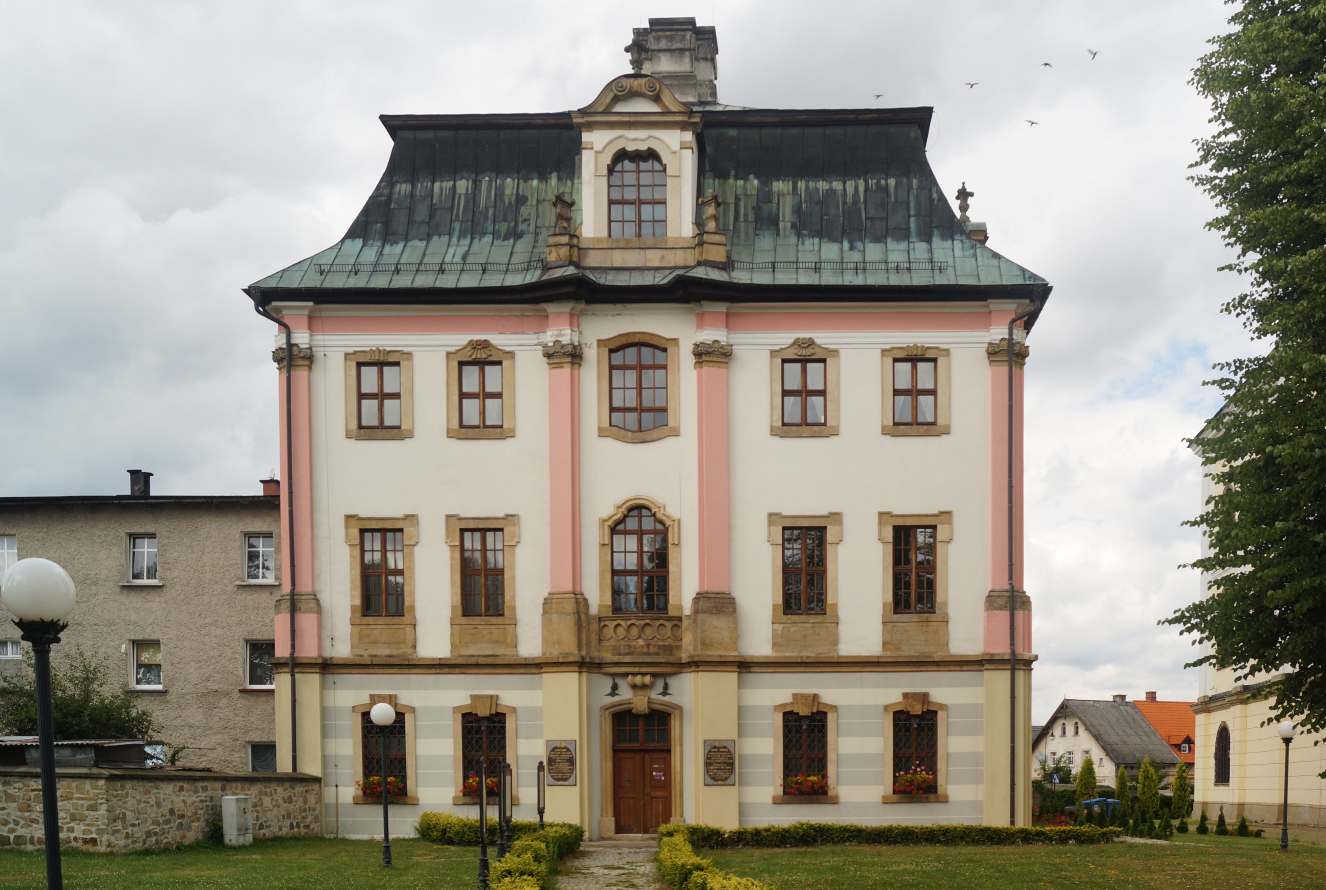 Kloster Grüssau - Gästehaus